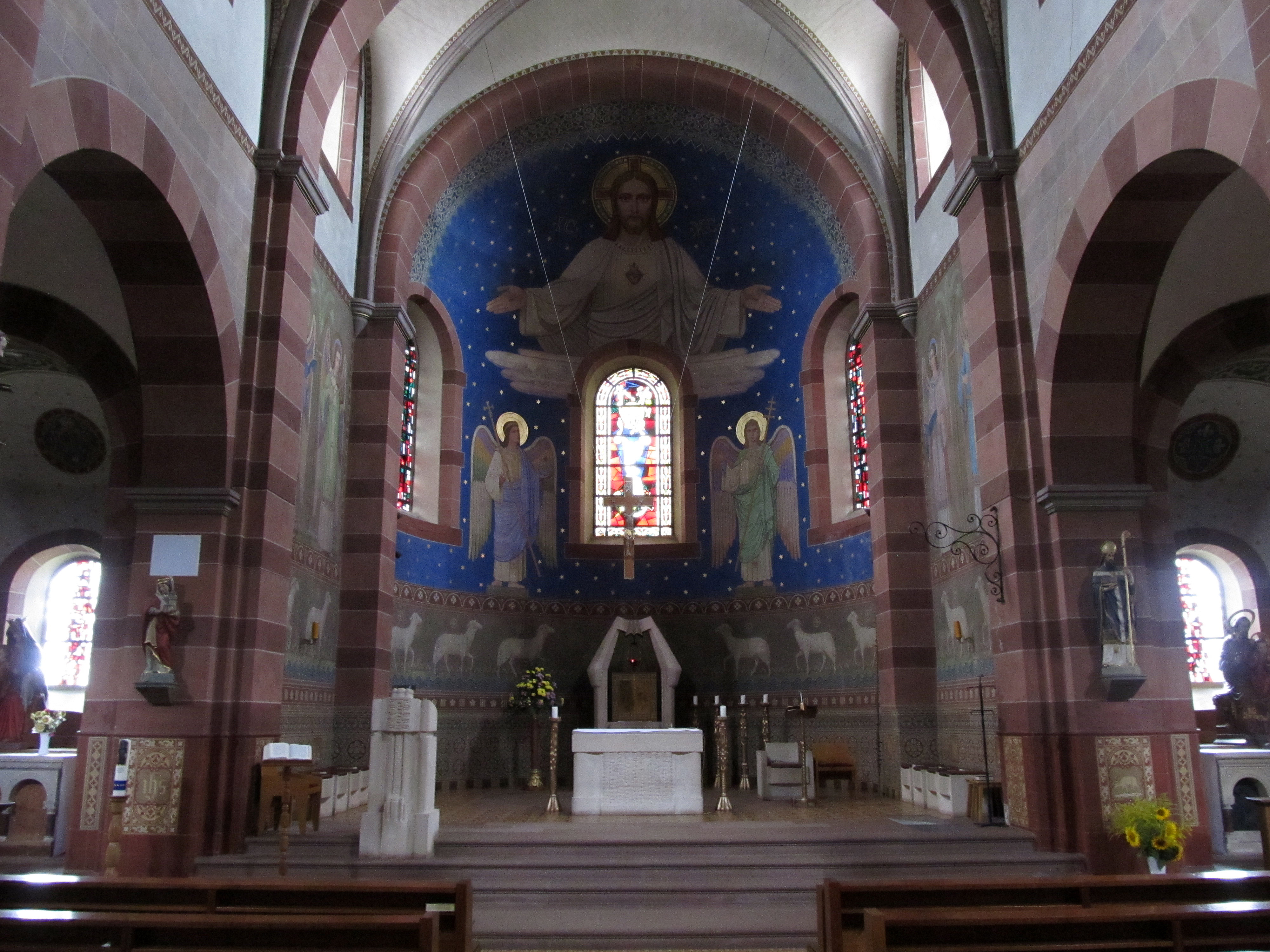 Altarraum der katholischen Pfarrkirche St. Remigius in Bliesen, einem Stadtteil von St. Wendel, Saarland